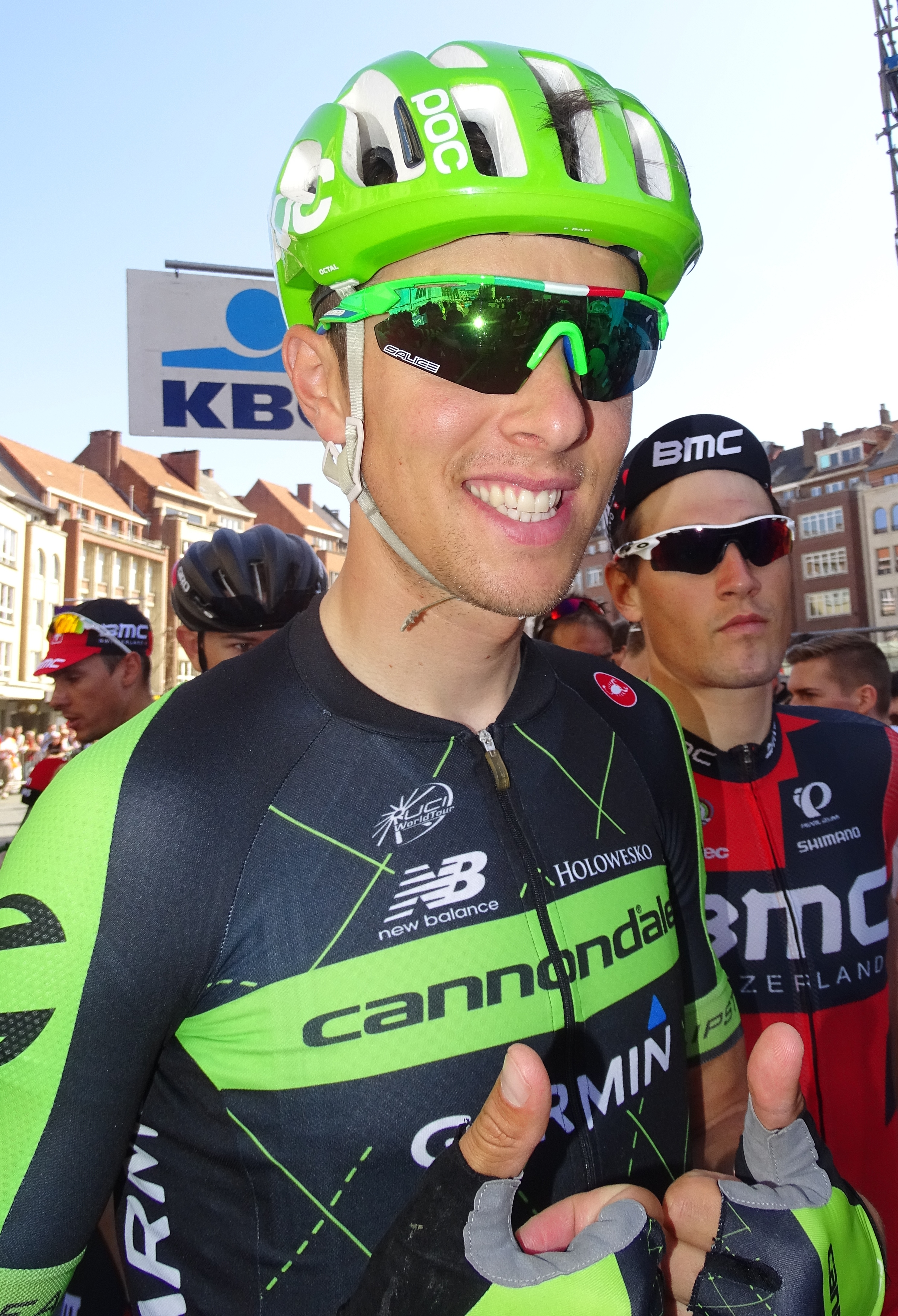 Reportage réalisé le mercredi 15 avril à l'occasion du départ de la Flèche brabançonne 2015 à Louvain, Belgique.